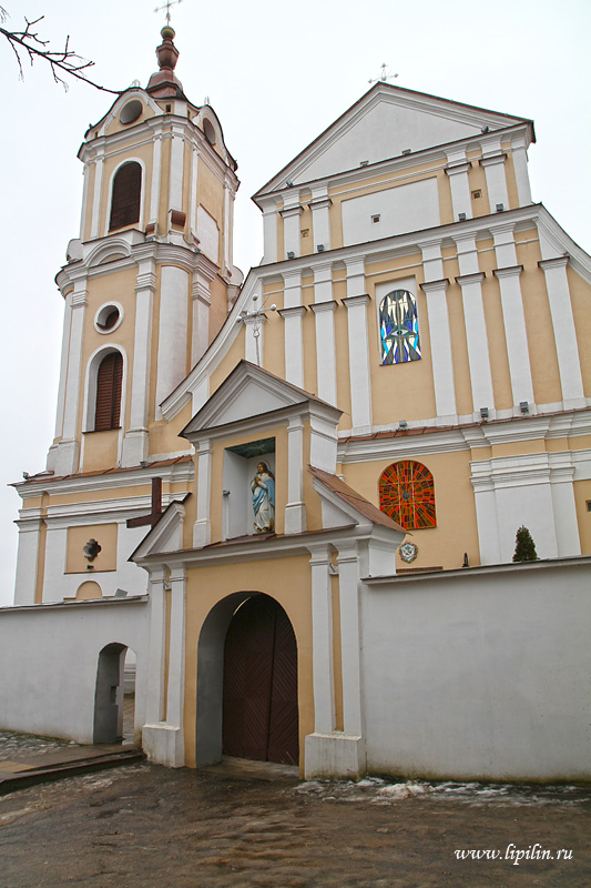 Гродна. Касцёл францысканскага кляштара